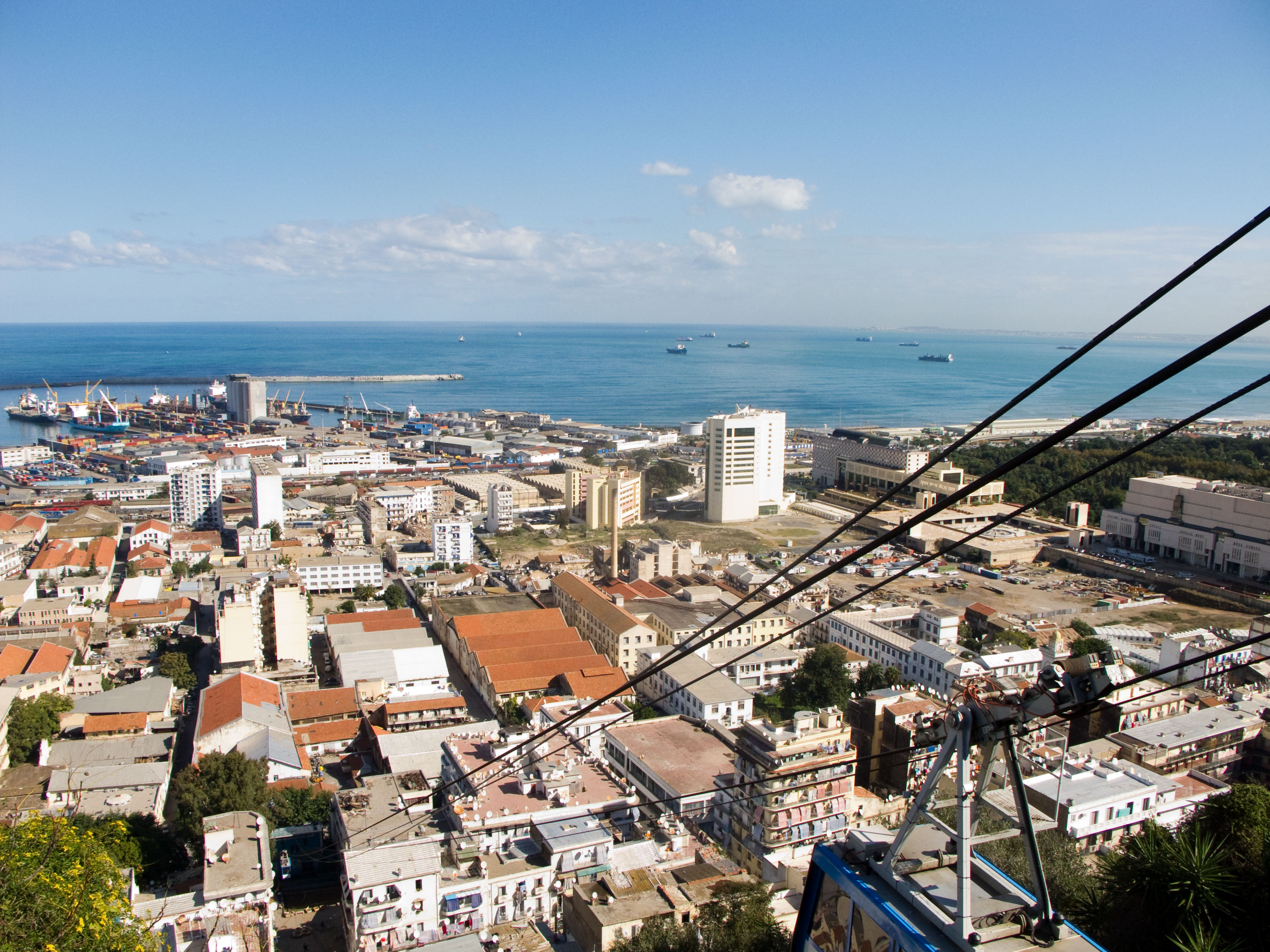 Téléphérique d'El-Madania, Alger, Algérie